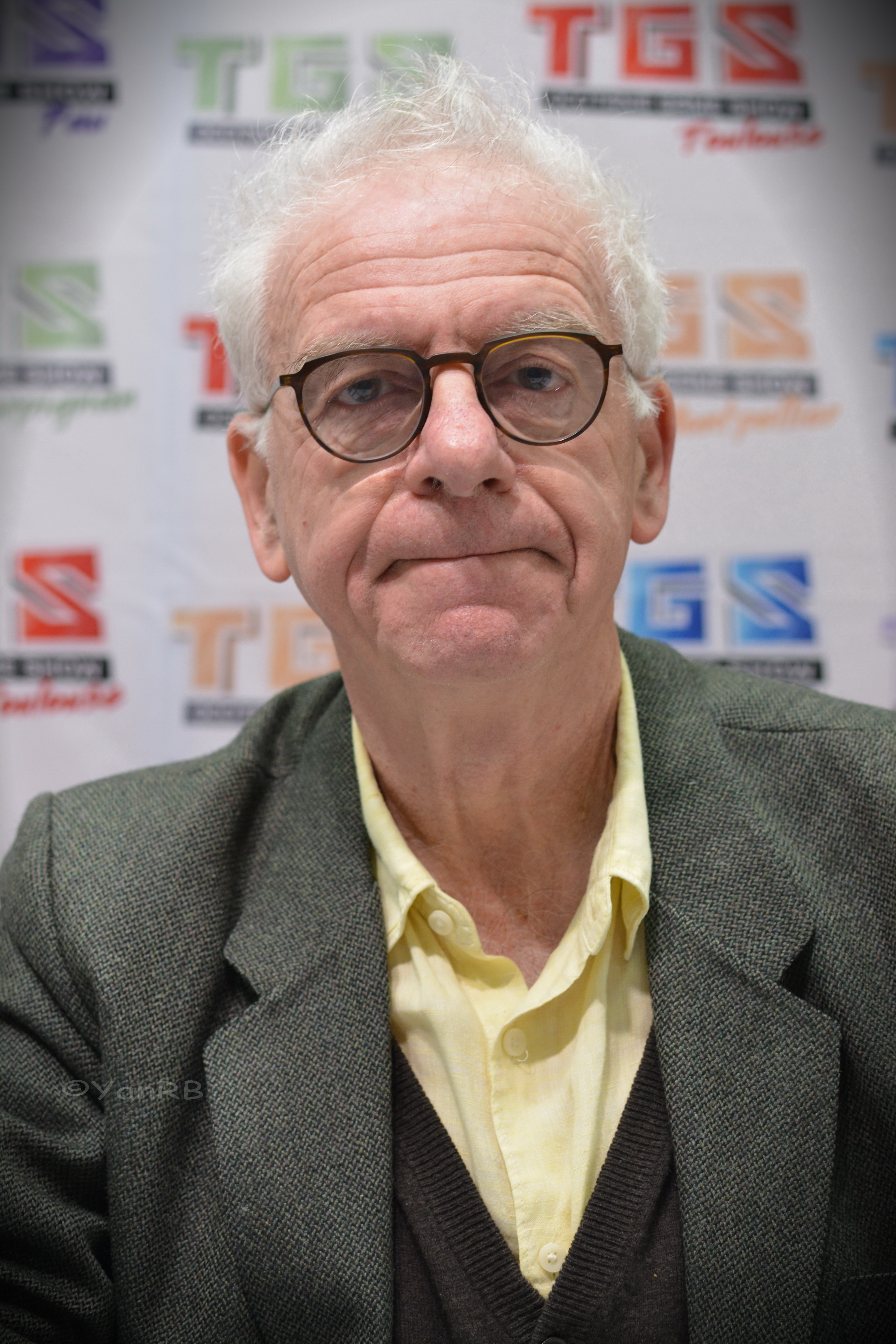 Jacky au TGS 2019 à Toulouse